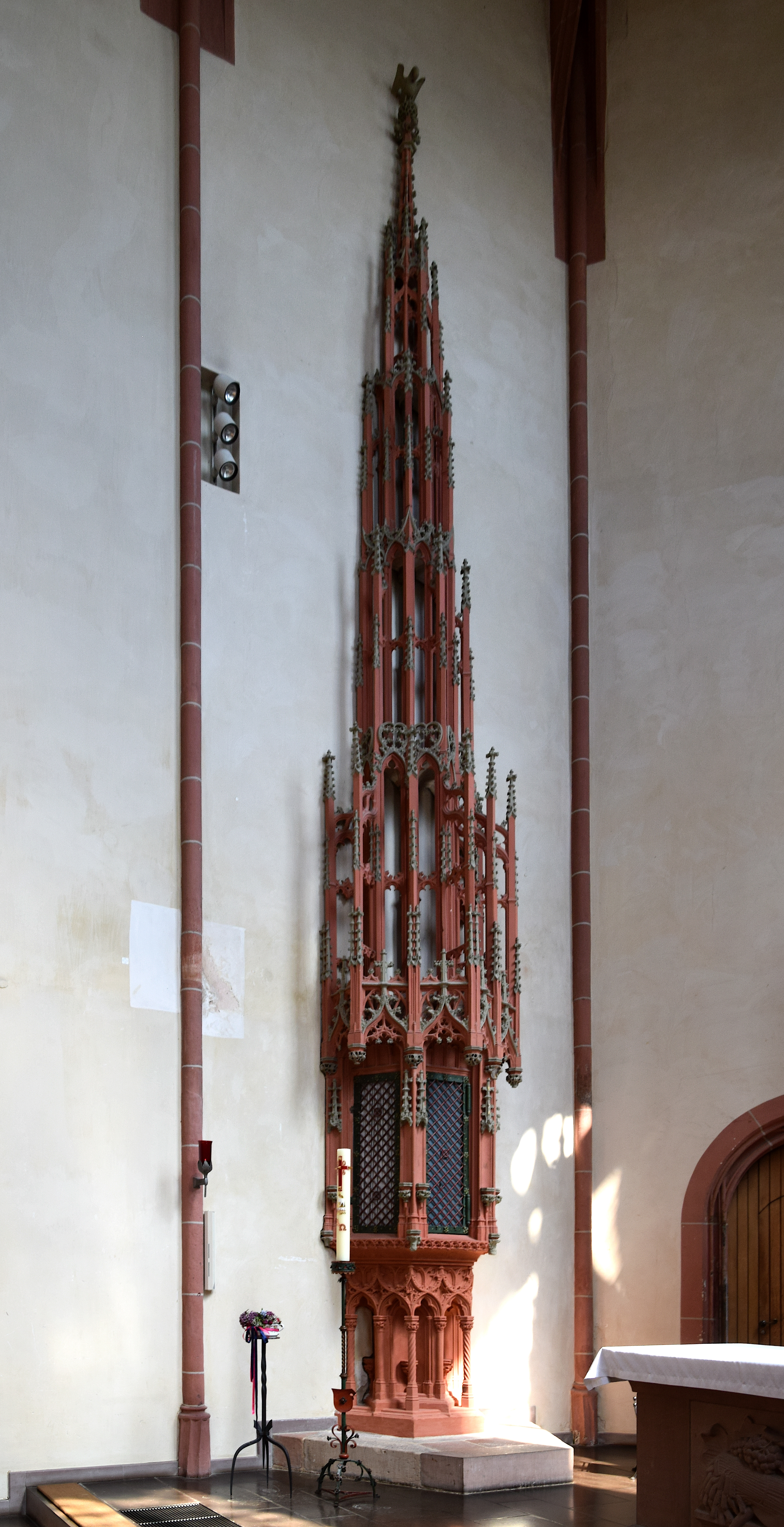 Wandtabernakel in St. Johannes Evangelist ("Kugelkirche") in Marburg